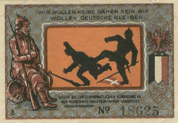 Notgeld aus Süderbrarup: Gutschein über 50 Pfennig